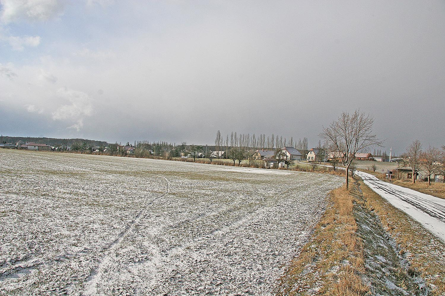 Pohled na Zachrašťany od Vysočan